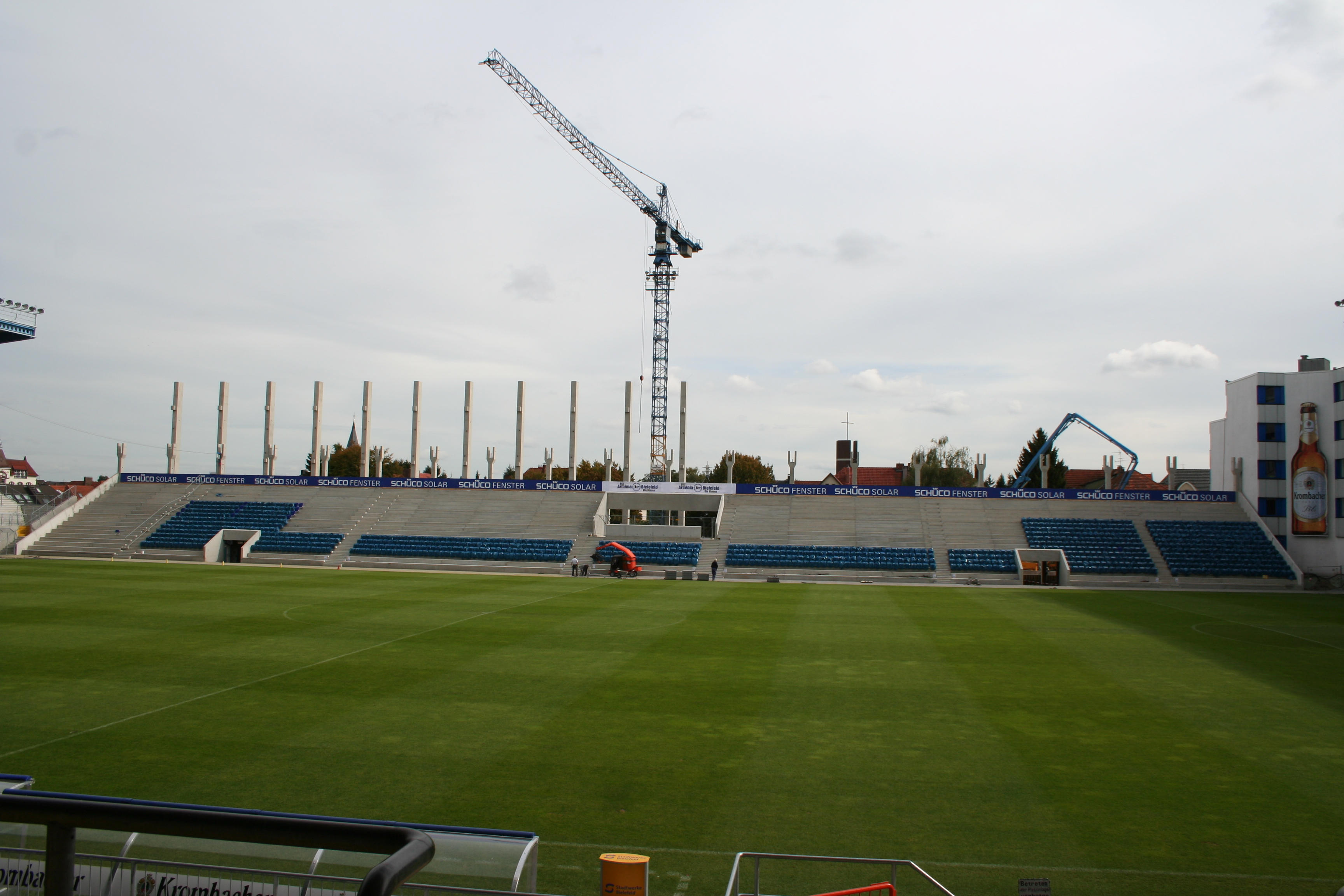 Im Bau befindliche Osttribüne der Bielefelder Alm